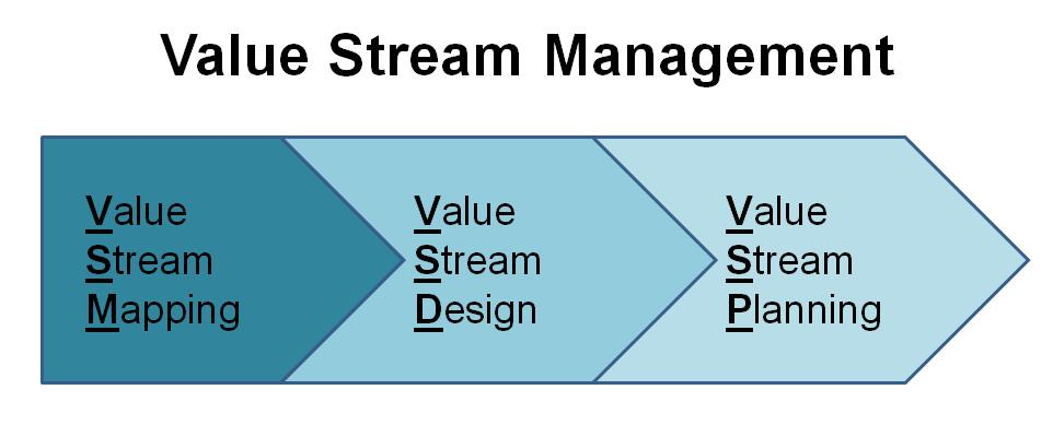 Abbildung der drei Teilschritte des Wertstrommanagements: Wertstromanalyse, Wertstromdesign und Wertstromplanung